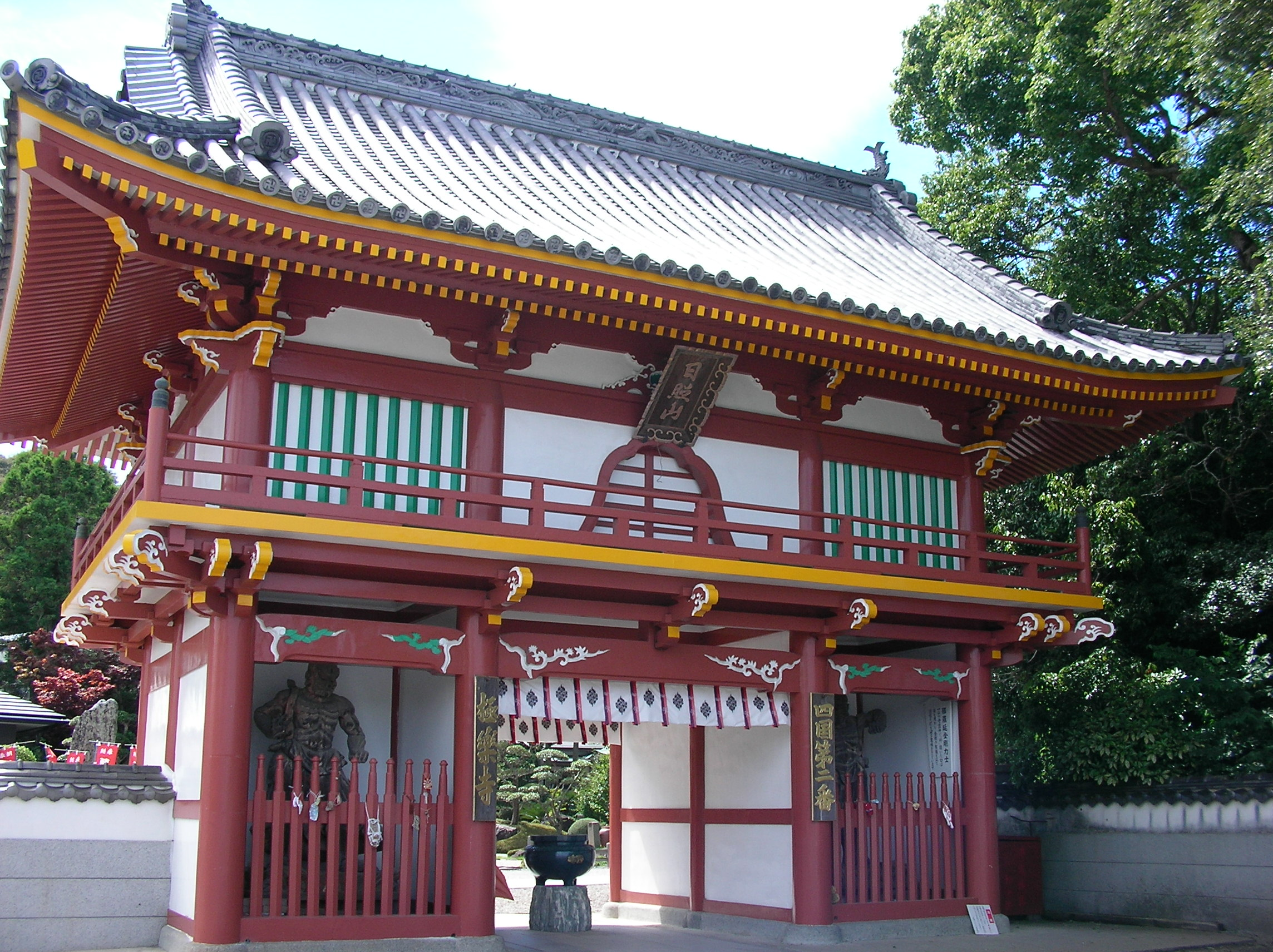 nishozan-gokurakuji-sanmon